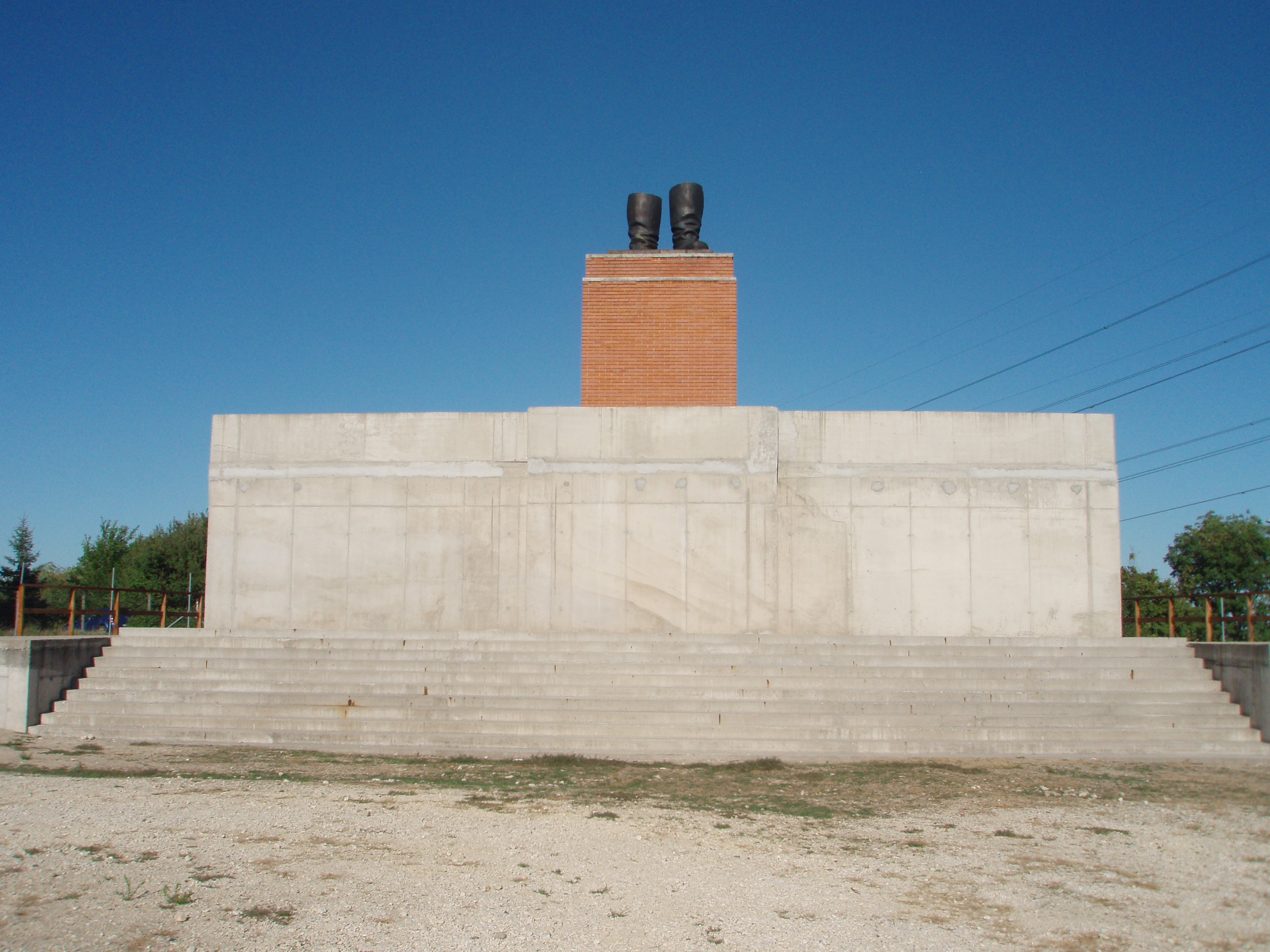 Szoborpark